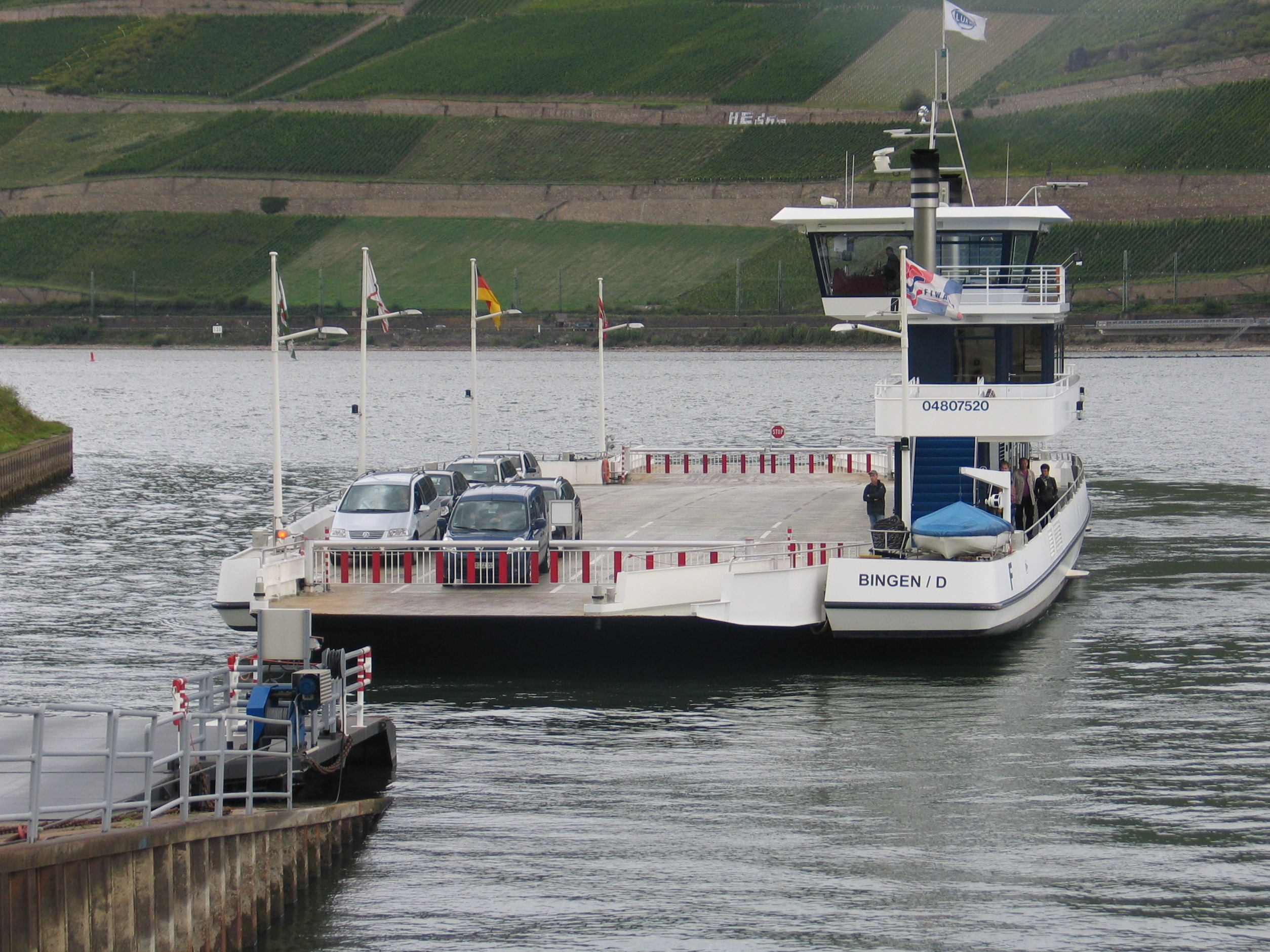 Veerpont Bingen Rüdesheim Duitsland